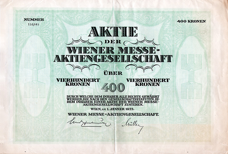 Aktie über 400 Kronen der Wiener Messe-AG vom 1. Januar 1922